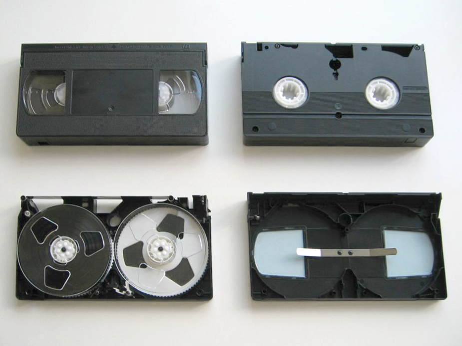 VHS-Kassette ganz und zerlegt andere Versionen